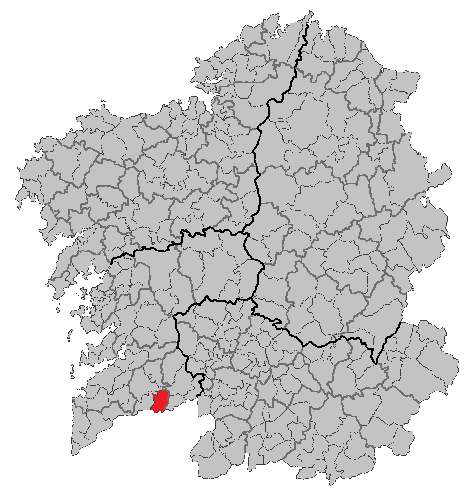 Mapa coa localización do concello de As Neves.